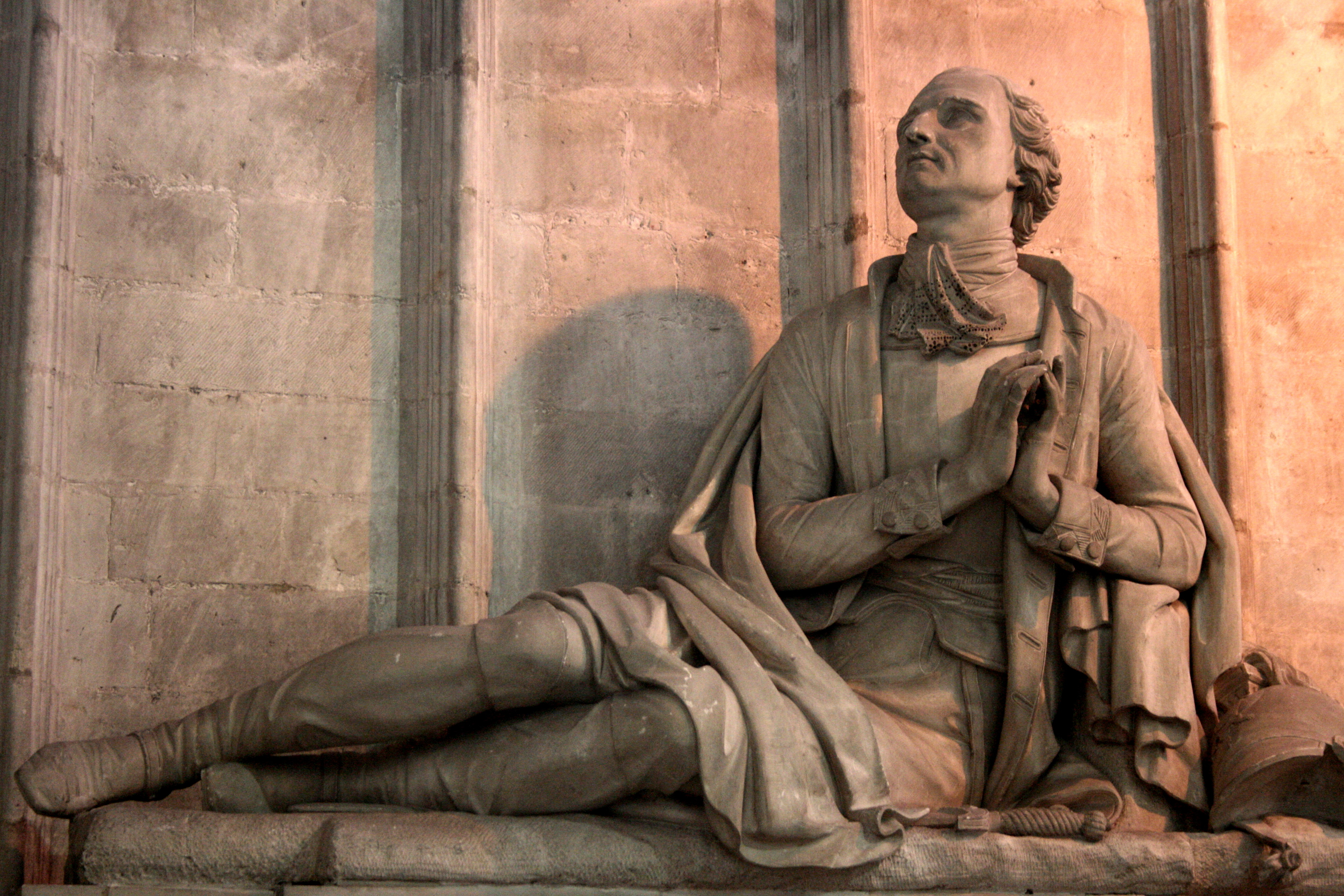 Église Notre-Dame du Sablon, Bruxelles (Belgique). Monument funéraire d'Auguste dal Pozzo par Jean-Frédéric Van Der Rit (1856)